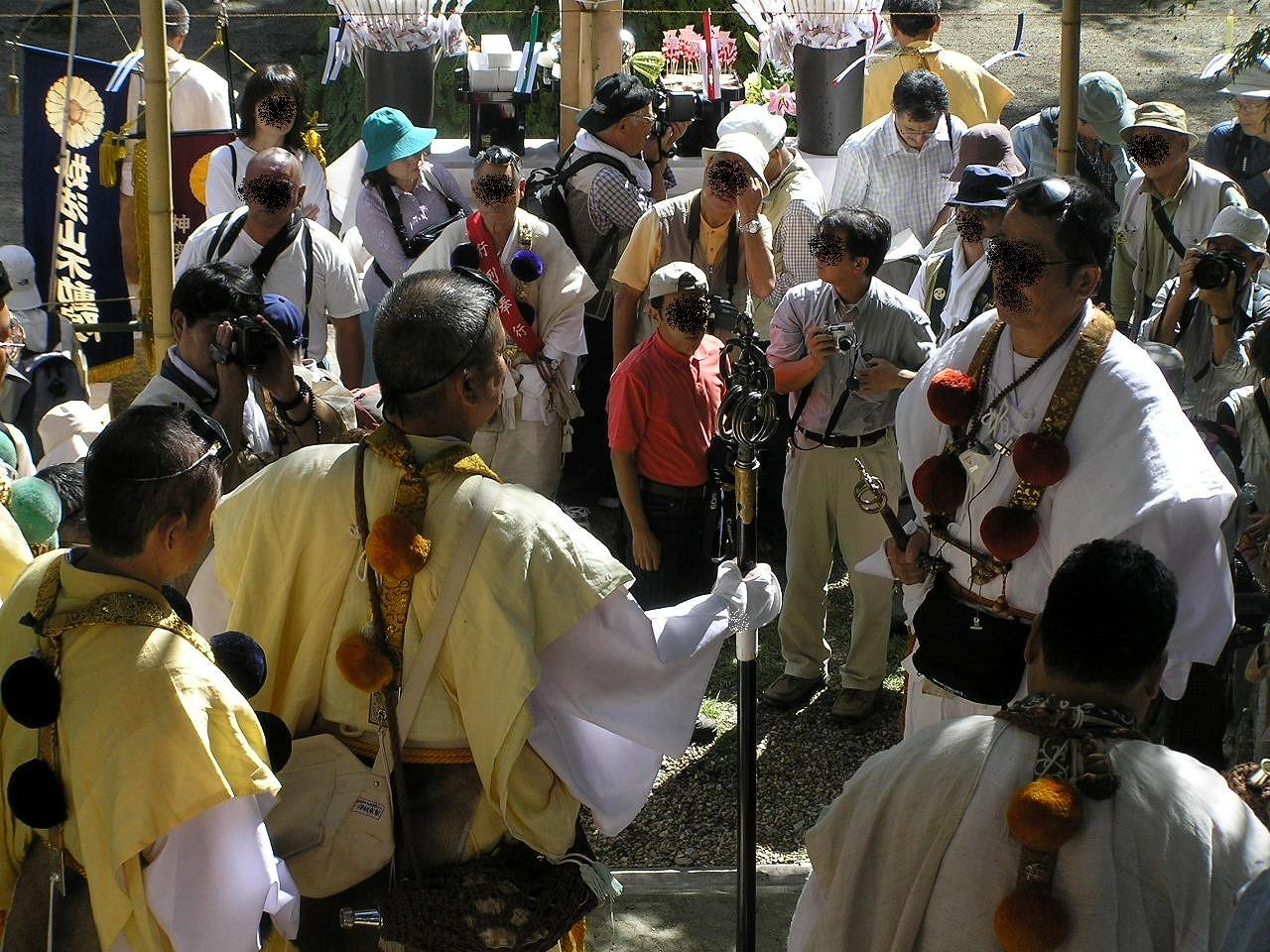 伏問答伽耶院10月第2月曜日 ― 採燈大護摩供